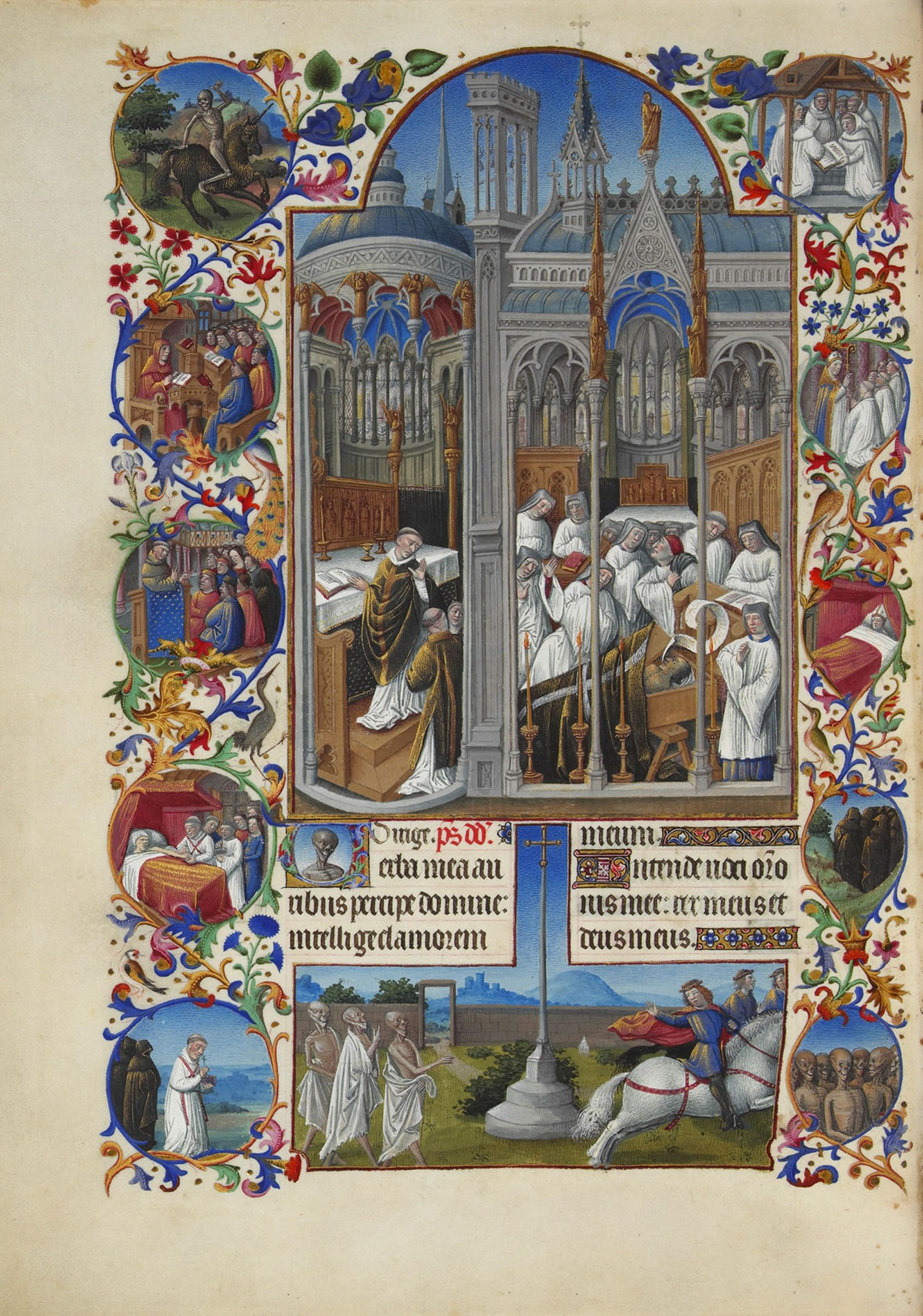 Scène de funérailles dans une église : Raymond Diocrès parle dans son cercueil par un phylactère. Scène des 3 morts et des 3 vifs en dessous du texte. Les marges sont composées de médaillons représentants des scènes de la vie de saint Bruno. Dessin des frères de Limbourg et peinture de Jean Colombe